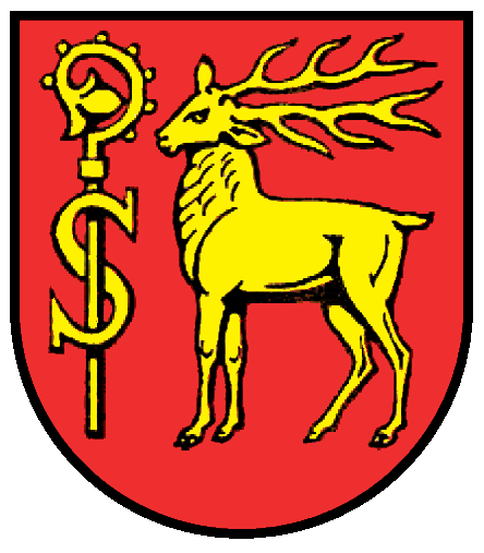 Wappen von Kalkreute, Gde. Ostrach, Baden-Württemberg, Deutschland